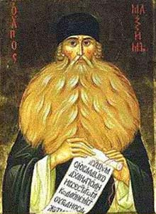 Maximus Confessor (православна икона)